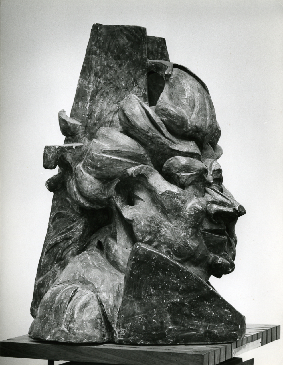 Umberto Boccioni, Antiograzioso (1912-1913), Roma. Galleria Nazionale d'Arte Moderna. Servizio fotografico : Roma, 1978 / Paolo Monti. - Stampe: 3 : Positivo b/n, gelatina bromuro d'argento/ carta, 24x30. - ((Al verso delle stampe manoscritti i numeri dei negativi corrispondenti (formato 35 mm) con indicazione del fotogramma: 3172/24, 3172/31, 3172/34; iscrizioni didascaliche manoscritte a matita; timbro a inchiostro con copyright (Corso Sempione - Milano). - Sul coperchio della scatola iscrizione didascalica manoscritta a pennarello nero: "Pittura". - Confronta scheda 3172L01-37. - Occasione: Documentazione per la pubblicazione: "Mostra di Medardo Rosso, 1858-1928", catalogo della mostra, Milano 1979, Milano, Società per le Belle Arti ed Esposizione permanente. - Fattura di Paolo Monti: IV. Commesse/ Fattura n. 15/ Fotografie per catalogo mostra sculture Medardo Rosso (1978/11/16), presso Archivio Paolo Monti. - Fonte: Monografia: Mostra di Medardo Rosso, 1858-1928: Palazzo della Permanente, Milano, gennaio-marzo 1979, catalogo della mostra, Milano 1979, testi di Luciano Caramel et al., Milano, Società per le Belle Arti ed Esposizione permanente (1979). - Fonte: Agenda di Paolo Monti: Nikon Leika 3001-/ Monti 1978 (1978-1982), presso Archivio Paolo Monti. - Fonte